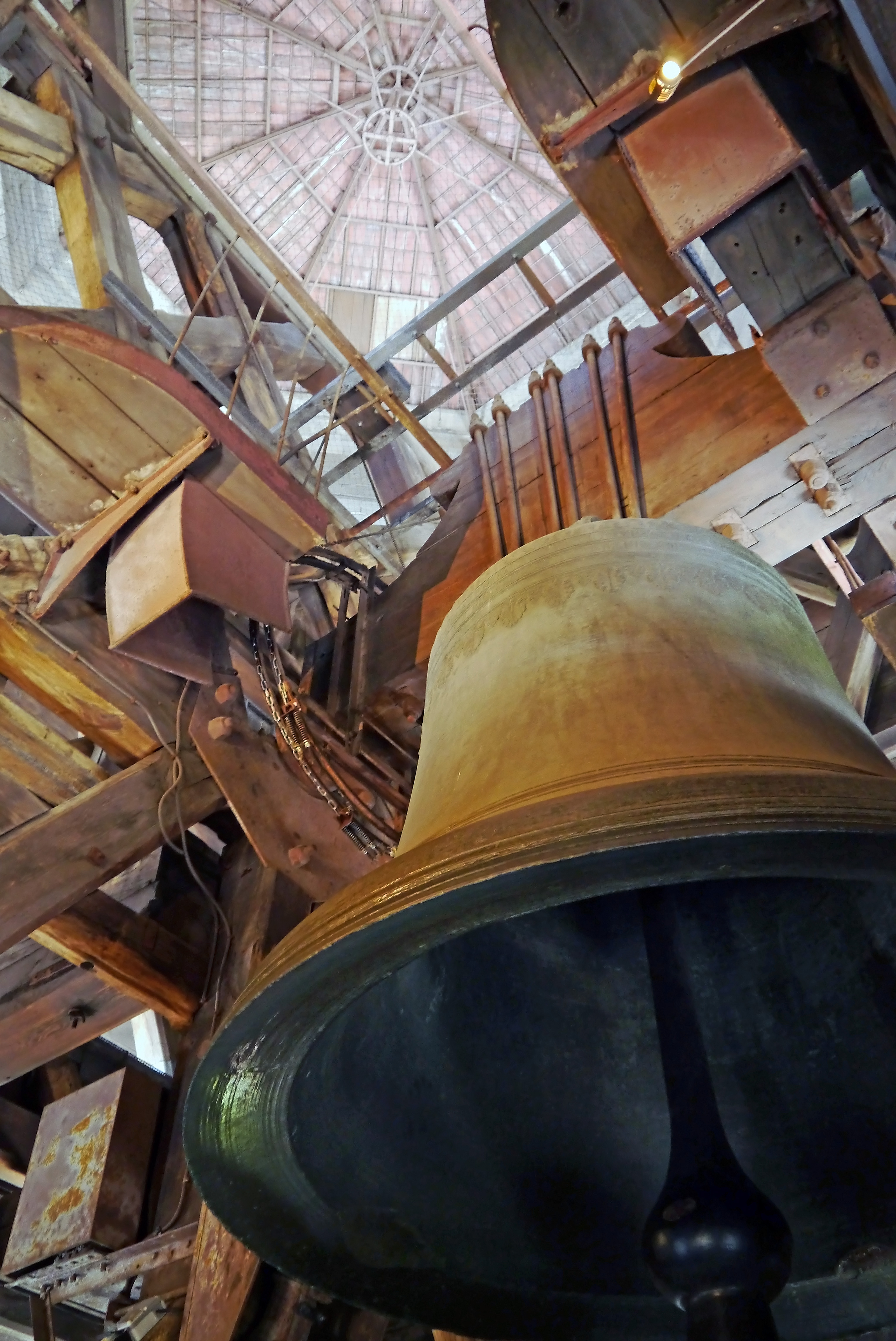 Cathédrale Notre-Dame de Paris.